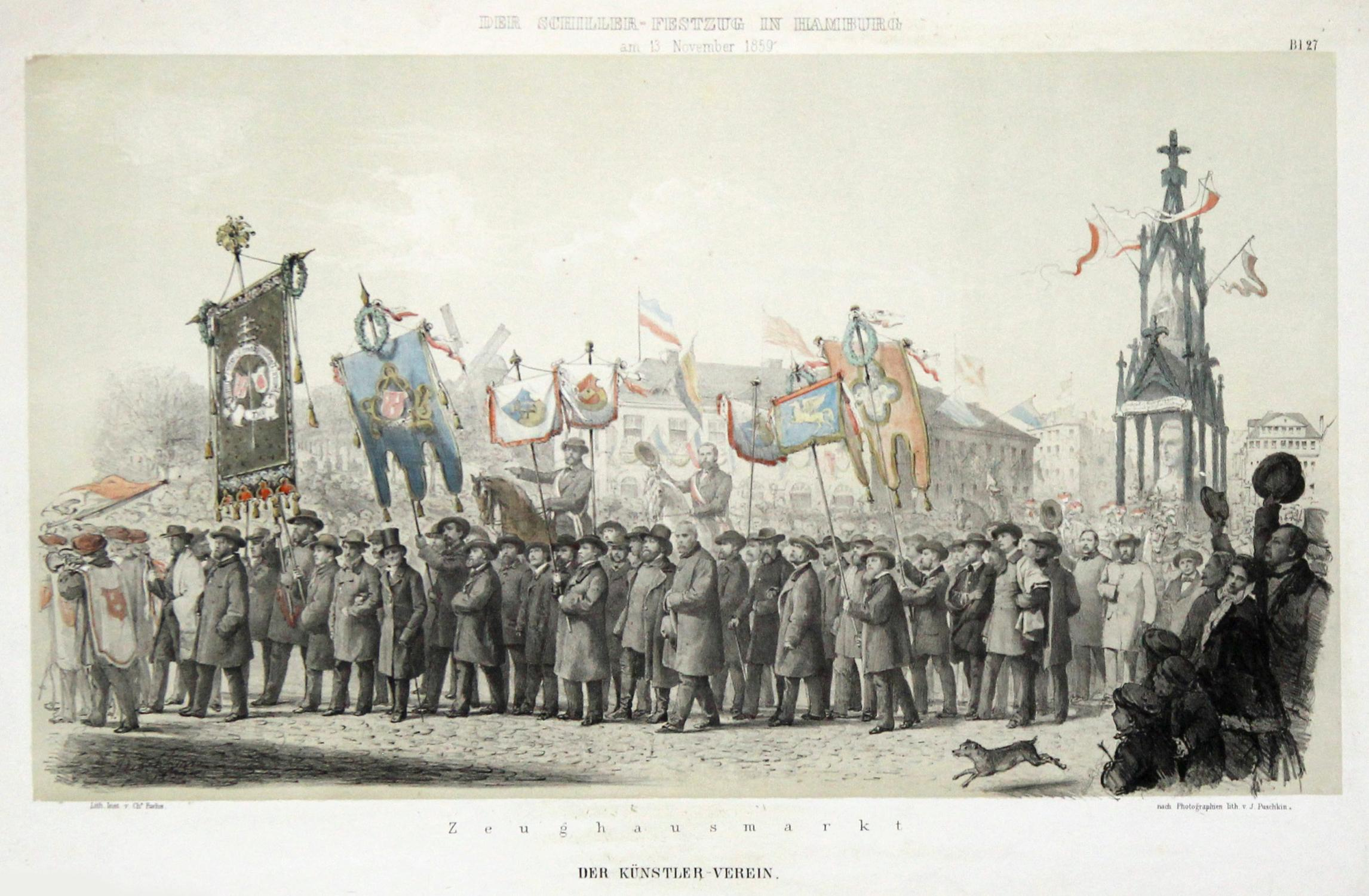 Lithographie von.Joseph Puschkin (nach Fotografien), Lithografisches Institut von Charles Fuchs, Hamburg, 1859, 25,7 x 43. Der Zug des Hamburger Künstlervereins, im Schiller-Festzug auf dem Zeughausmarkt am 13. November 1859. Vorne mit dem weißen Mantel und dem Stab in der Hand der Präsident des Vereins Ernst Glüer, begleitet von Otto Speckter und Carl Martin Laeisz. Darauf folgte das große Banner des Vereins, das 1852 von Hamburger Frauen dem Verein überreicht wurde und das nun von Martin Gensler getragen wurde, mit Unterstützung von den Malern Peter Gustav Brünner und Friedrich Wilhelm Lucas. Dem Banner schloss sich eine kleine Anzahl von Mitgliedern des Vereins mit zwei Standarten an. Auf einer Standarte war Pegasos abgebildet und auf der anderen von 1848 das Hamburger Wappen mit einem Hanseatenkreuz der Hanseatischen Legion. Die erstgenannte Standarte war die älteste des Vereins und war ein Geschenk von dem Architekten Eduard Stammann, der sie aus Rom mitbrachte. Sie wurde einst von Ludwig Schwanthaler bemalt und diente den Deutschrömern bei den Cervarofesten. Darauf folgten drei getragene kleinere Fahnen, die extra für den Festzug bemalt wurden und mit den darauf befindlichen Symbolen die Architektur, die Bildhauerei und die Malerei darstellten.